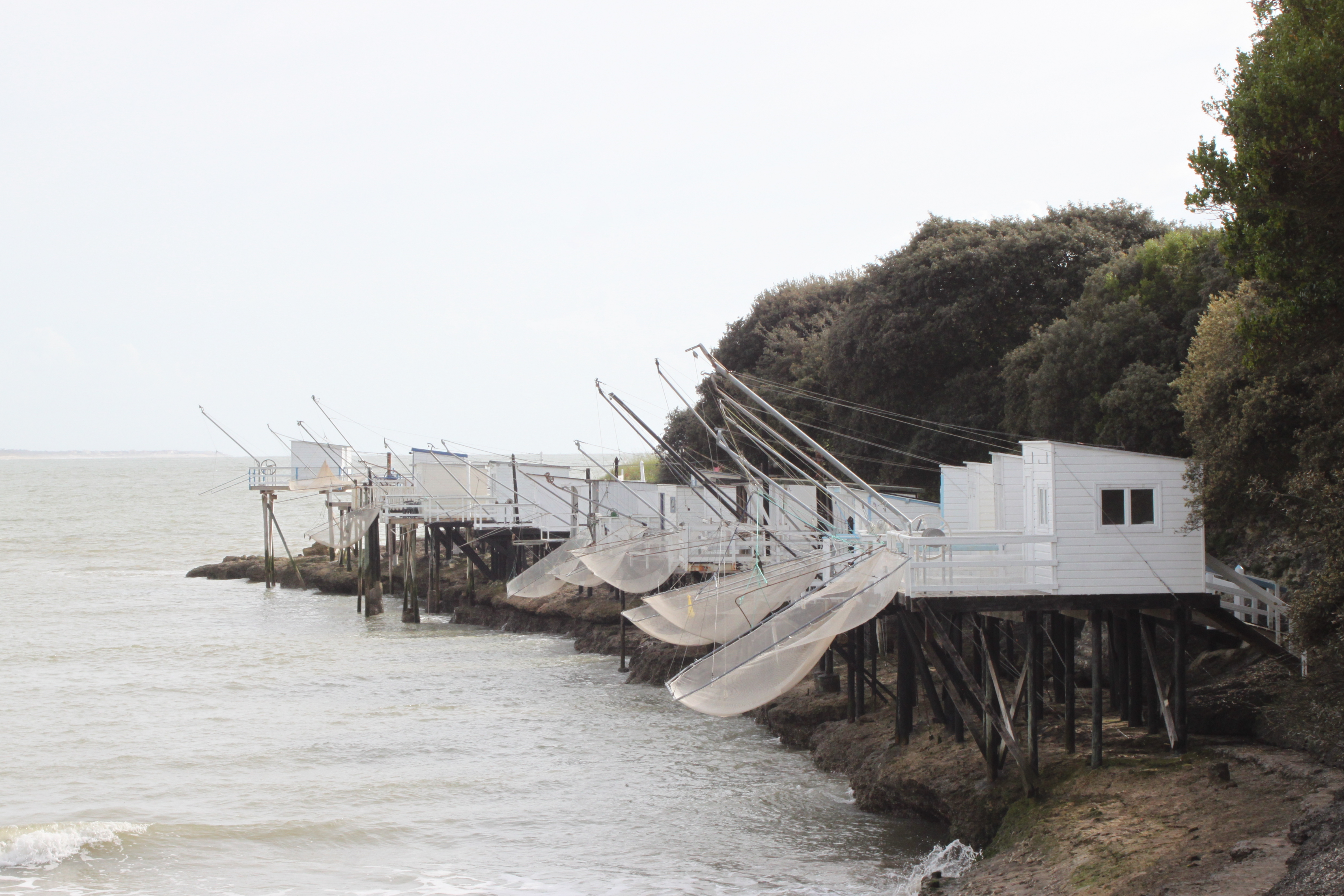 Carrelets, conche de Pontaillac, face à la plage de Royan, Fr-17-Vaux-sur-Mer.